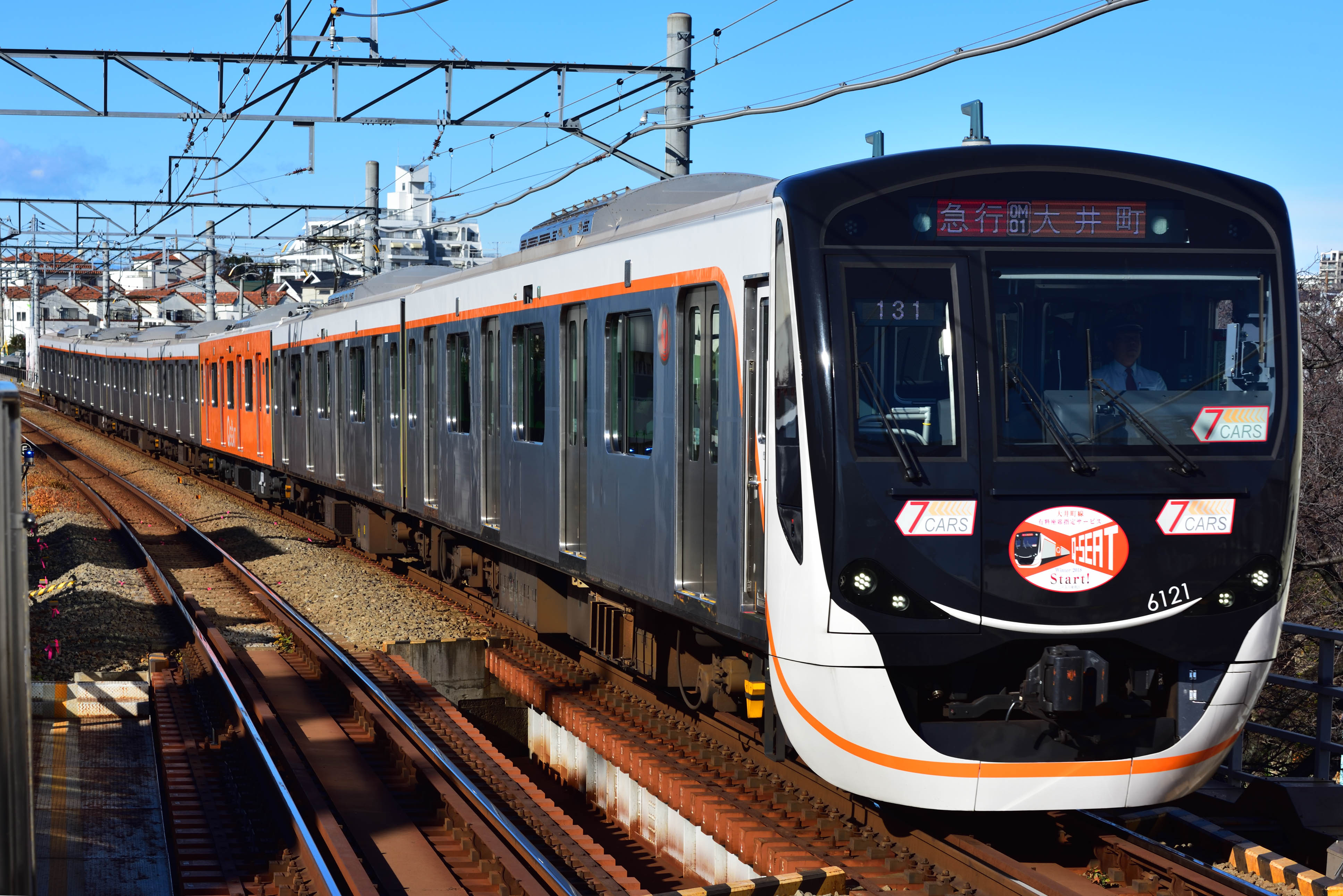 東急6020系（Q SEAT組み込み）。大井町線 緑ヶ丘駅。 Nikon D750